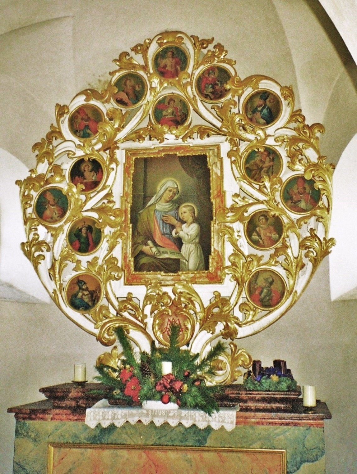 Filialkirche St. Ulrich, Pirk, Annenaltar